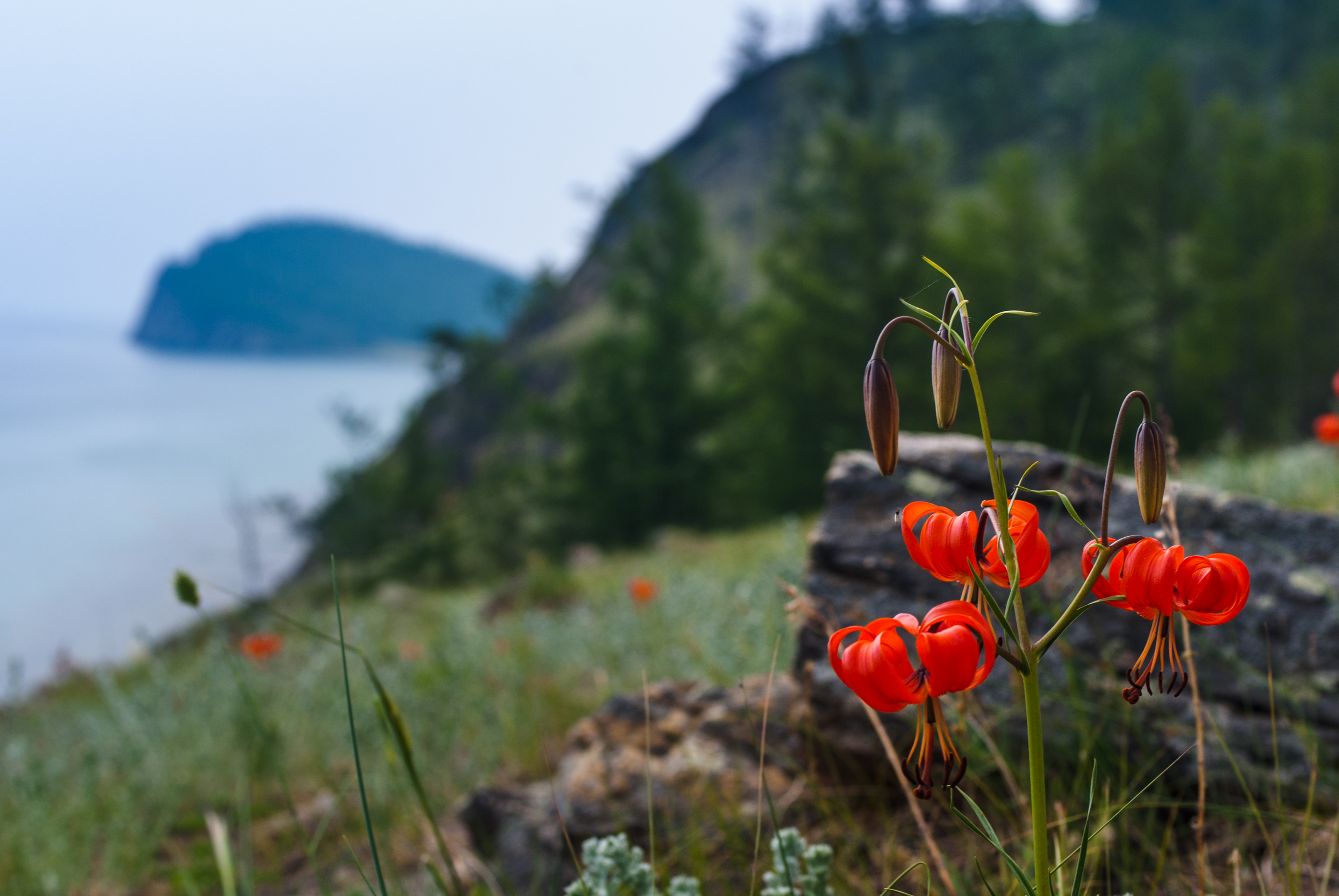 Прибайкальский: Территория парка в виде узкой полосы охватывает большую часть (около 470 км) западного побережья озера Байкал - от п. Култук на юге до мыса Кочериковского на севере. Можно сказать, что это самый "протяженный" из национальных парков России. Он занимает восточные склоны Приморского хребта, южную часть Олхинского плато, бассейн р. Большая Речка (впадает в р. Ангару), а также о. Ольхон. Южная часть парка рассечена вытекающей из Байкала могучей Ангарой.,Иркутский район, Иркутская область This image is related to the protected area of Russia number 3800118